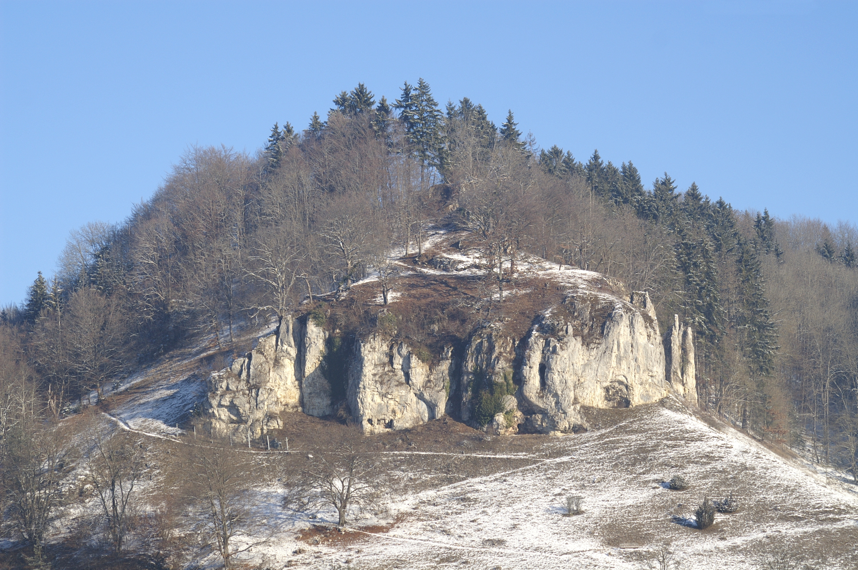 Schloss Justingen stand auf diesem Berg oberhalb von Hütten im Alb-Donau-Kreis